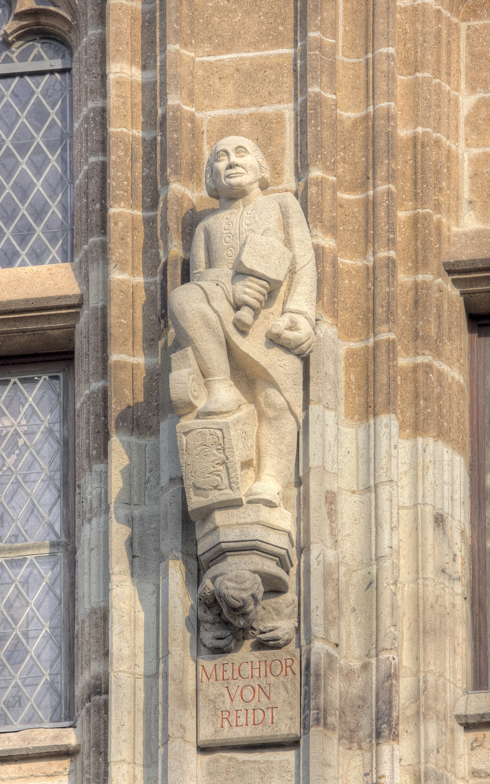 Rathausturm Köln mit der Figur des Melchior von Reidt. Thema der Konsole unter der Reidt-Statue: „Norbert Burger“. Bildhauer: Heribert Calleen This is a photograph of an architectural monument.